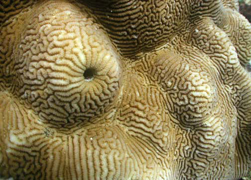 Leptoria phrygia en Samoa Americana